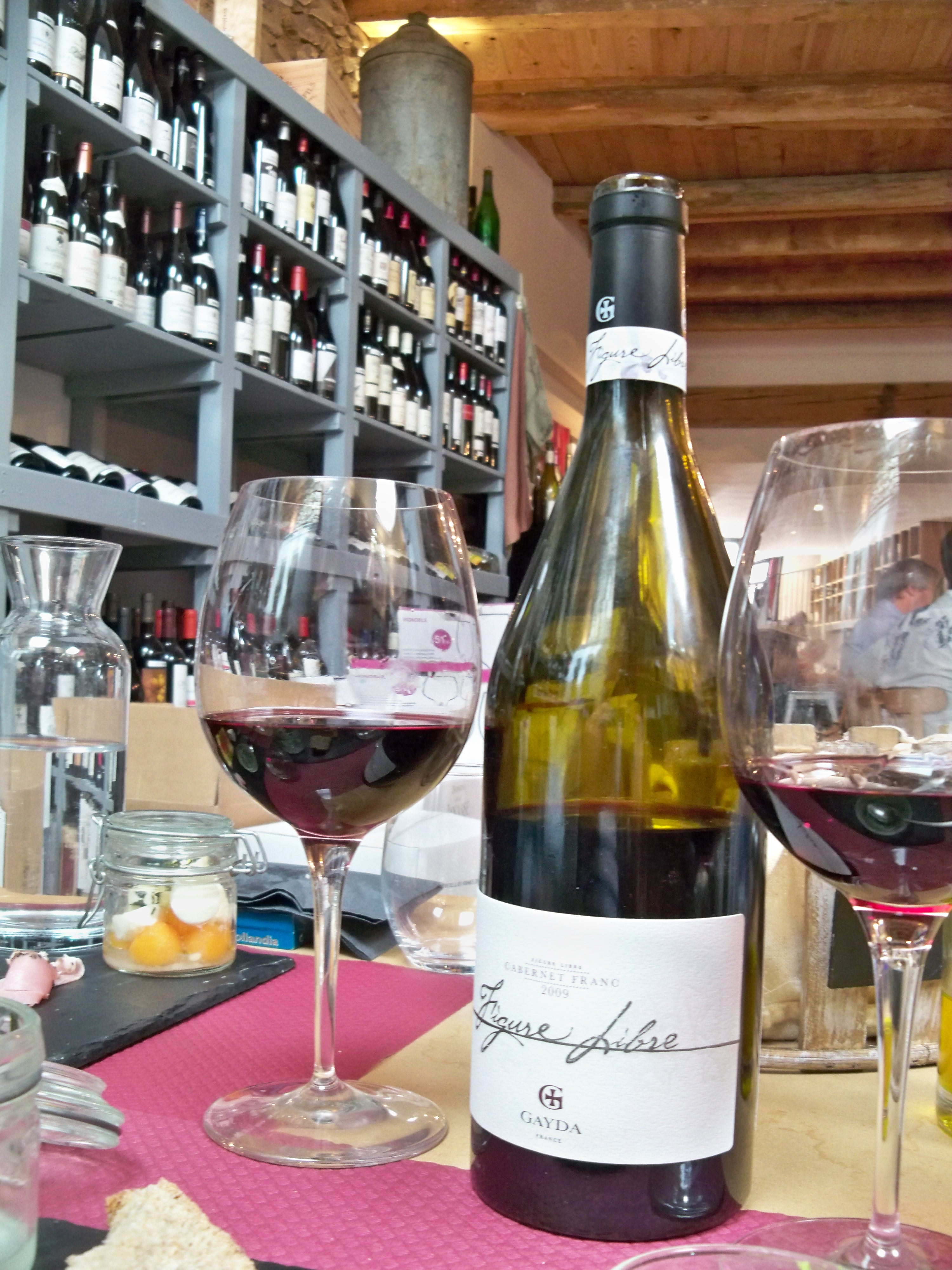 Vin de pays d'oc